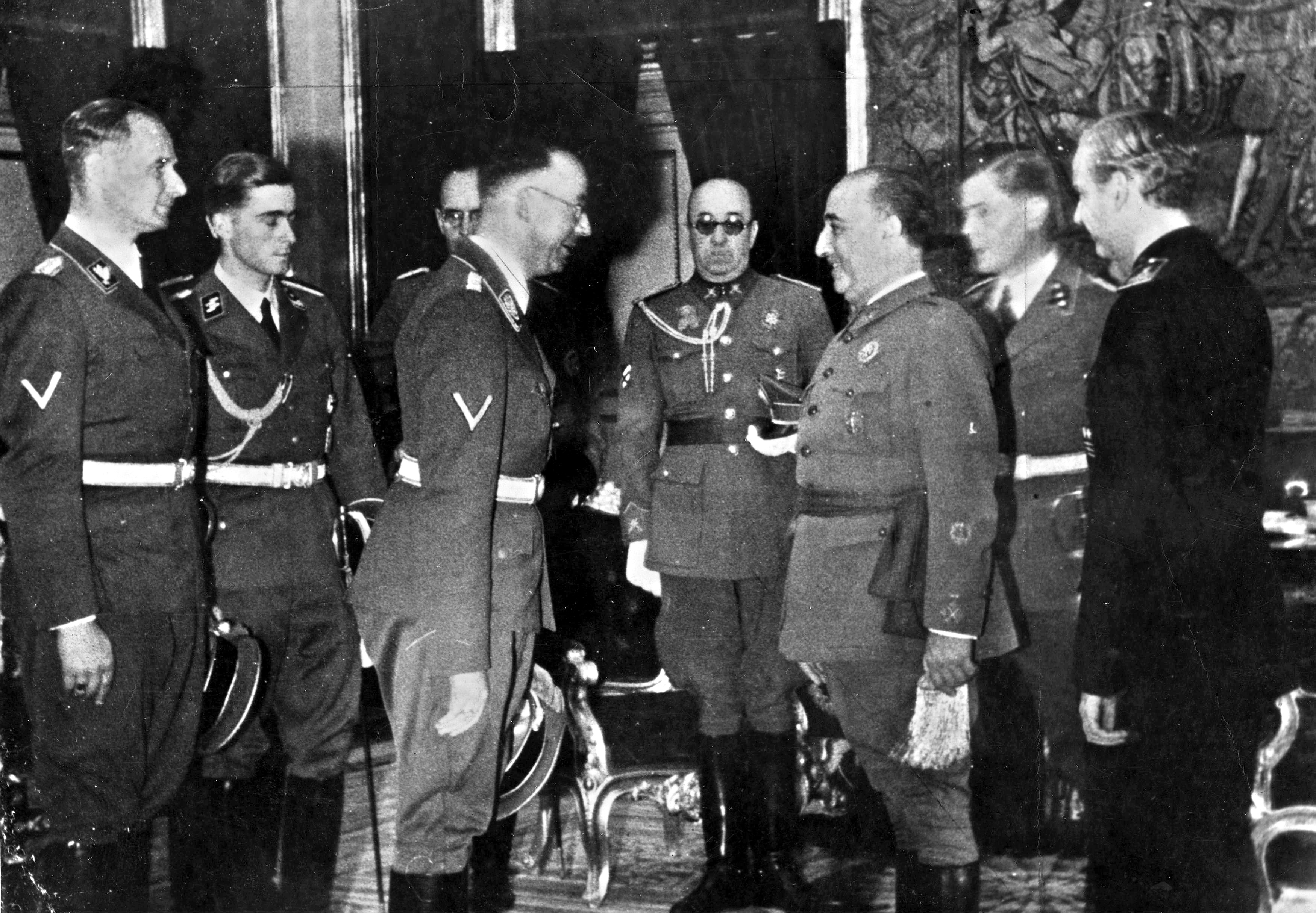 Encuentro entre Heinrich Himmler y el dictador Francisco Franco, en el Palacio de El Pardo de Madrid.